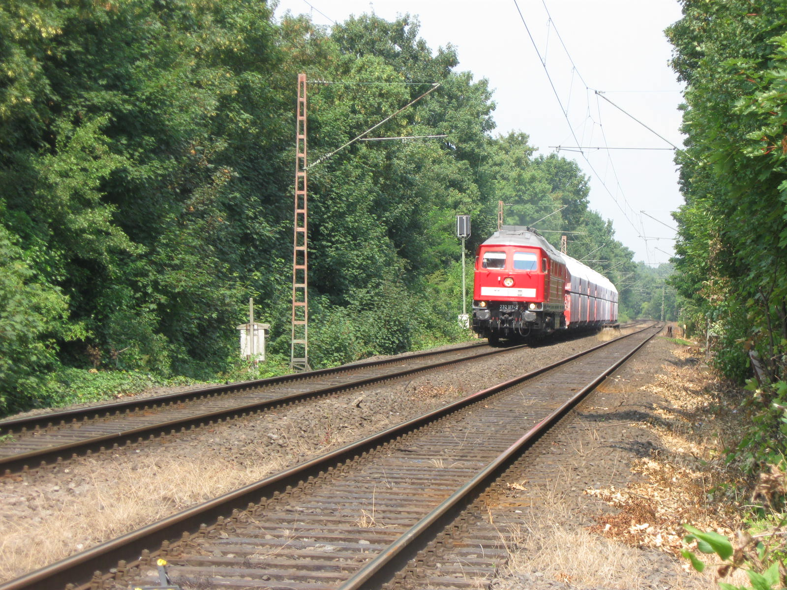 Strecke 2331: DBAG-Baureihe 232 in Duisburg-Meiderich aus Duisburg-Beeck kommend